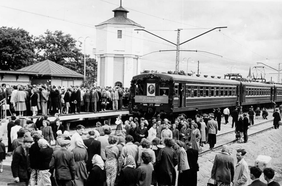 Vana foto Keila jaamast